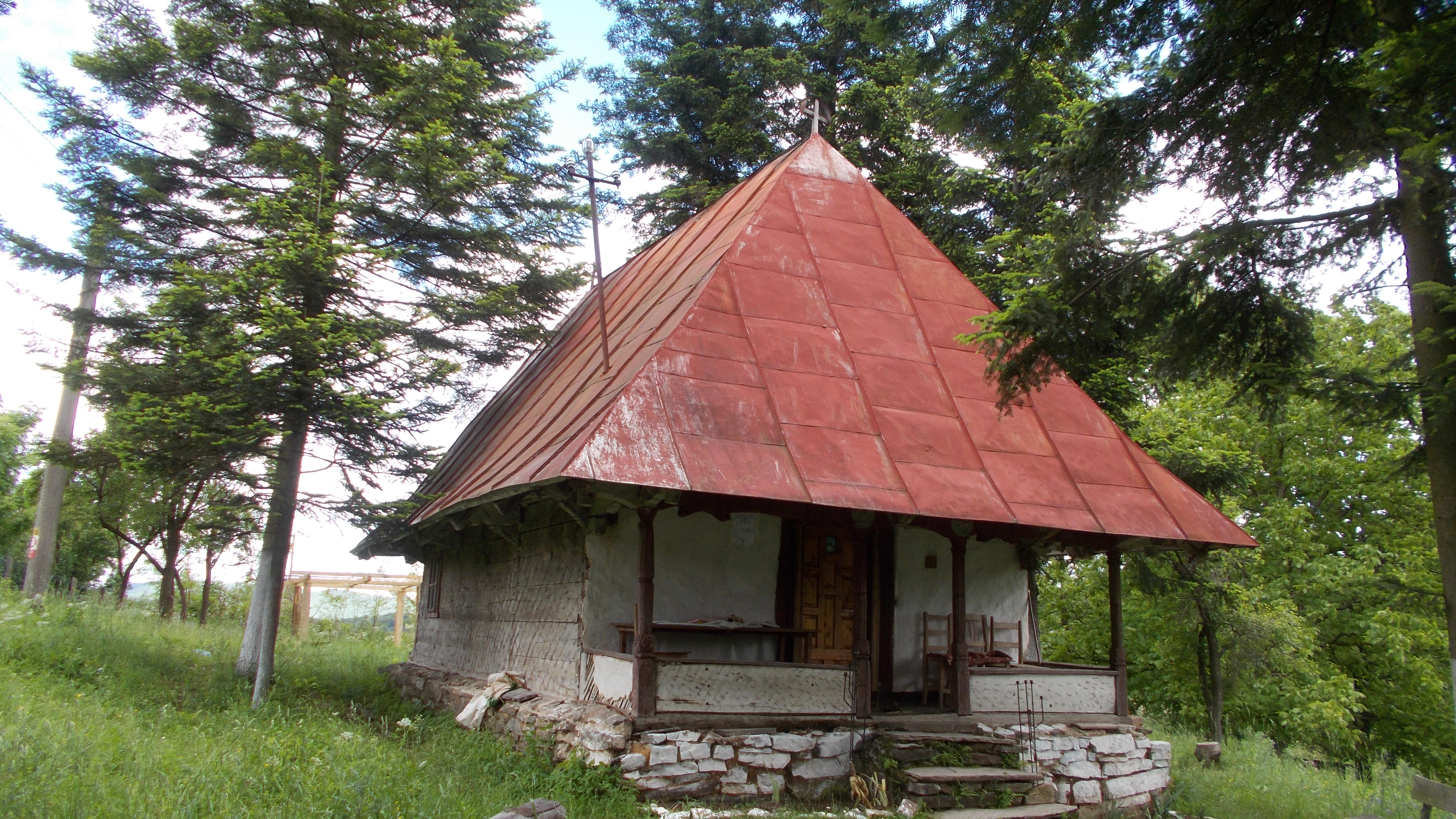 Biserica de lemn din Costești, Mehedinți